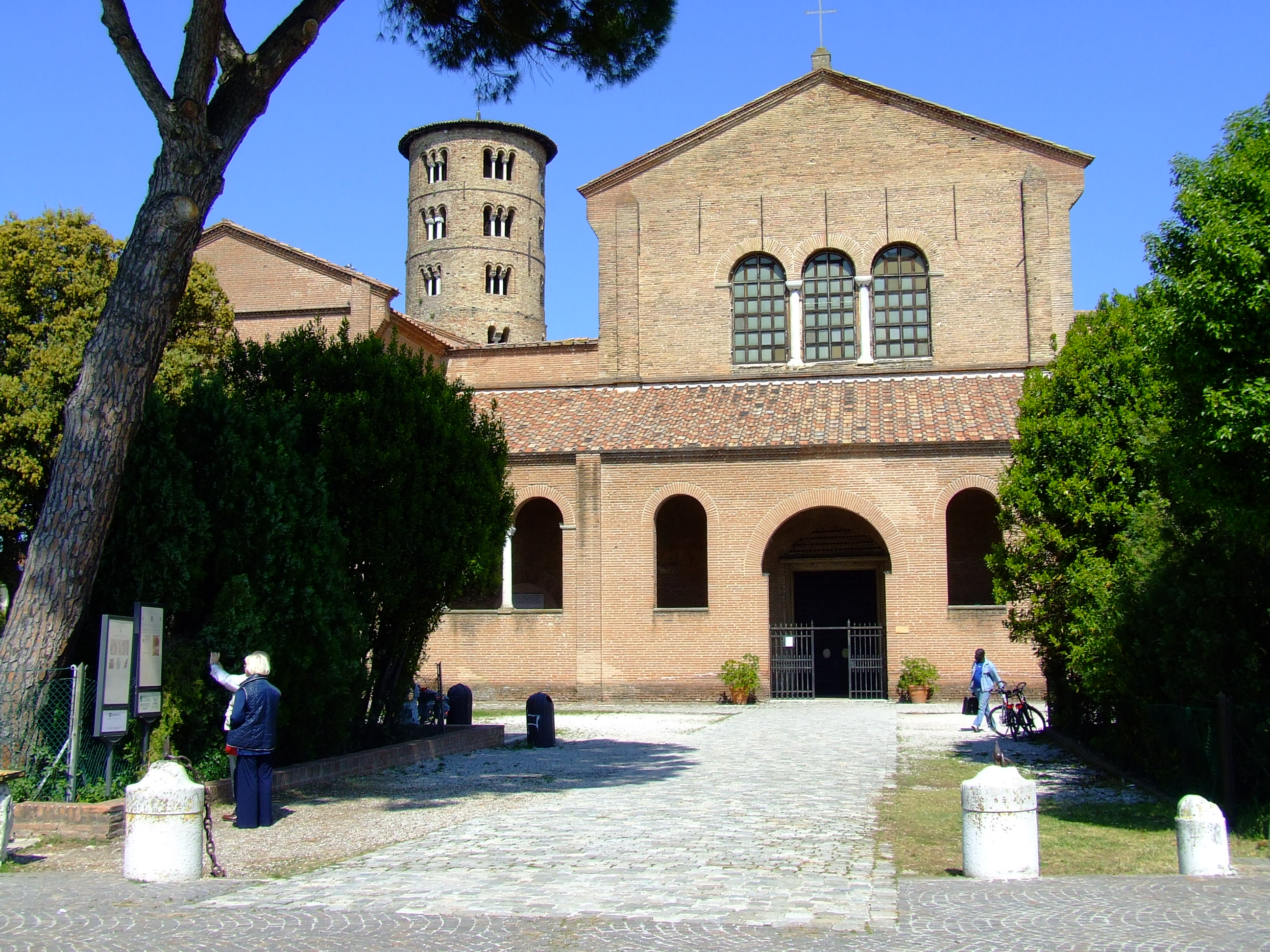 Basilica di Sant'Apollinare in Classe This is a photo of a monument which is part of cultural heritage of Italy.